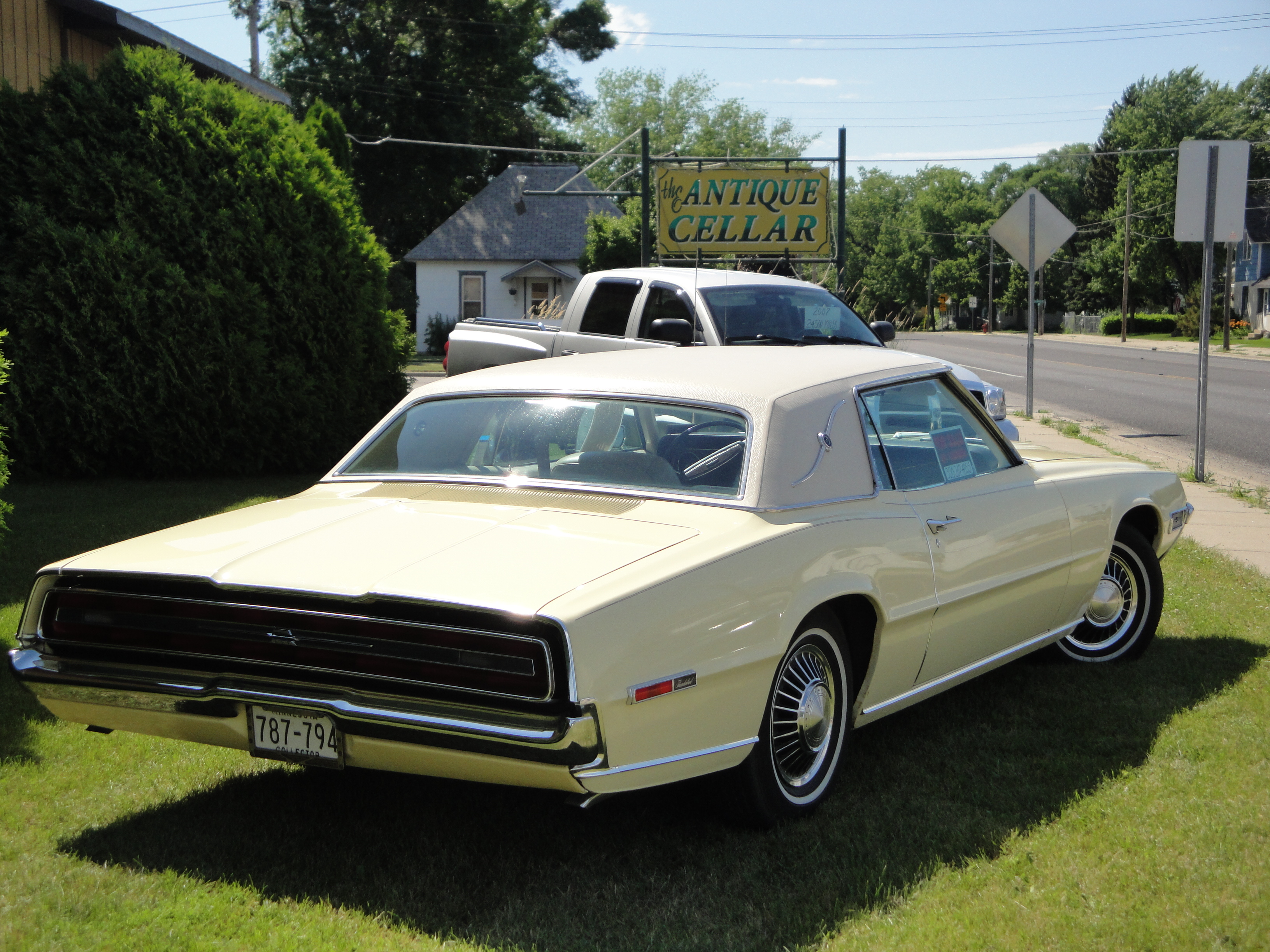 68 Ford Thunderbird